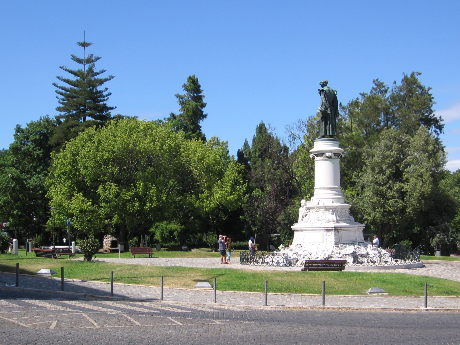 Campo Santana